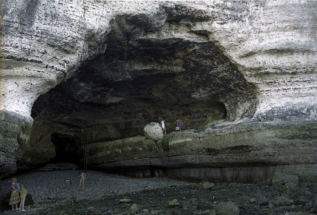 photo prise par Samy (User:cslevine) en Juillet 1981, au Canon A1. la grotte du Trou à l'homme doit son nom à un événement passé ou une légende : un bateau aurait été échoué lors d'une tempête et un homme aurait été retrouvé vivant dans cette grotte. Epoque de l'événement vers le 18e ou 19e siècle. Aujourd'hui cette grotte présente sur le côté droit l'entrée du tunnel creusé, d'une vingtaine de mètres, donnant à marée basse accès à la plage de Jambourg, faisant face à l'Aiguille.